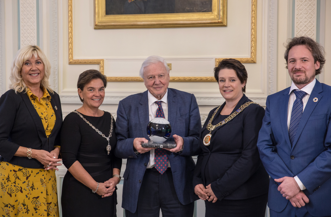 Sir David Attenborough mottar "Bærekraftsprisen" 2018 på Den Norske Klub i London. F.v. Marit Warncke, Lisbet Nærø, Sir David Attenborough, Marte Mjøs Persen og Ole Reinert Berg-Olsen